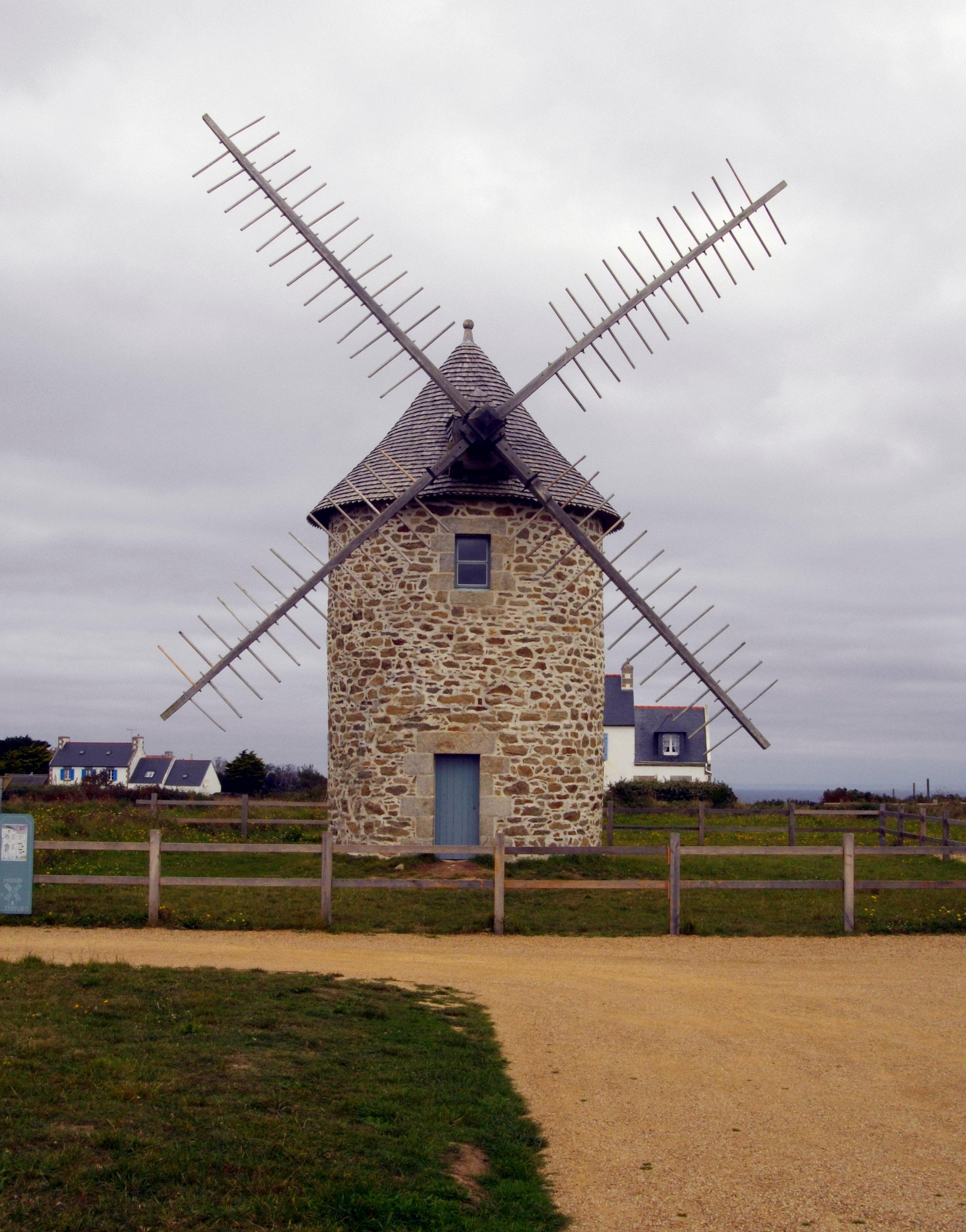 Le moulin à vent de Trouguer à Cléden-Cap-Sizun (Finistère). Ce moulin a été construit vers 1830 et a fonctionné jusqu'en 1952.